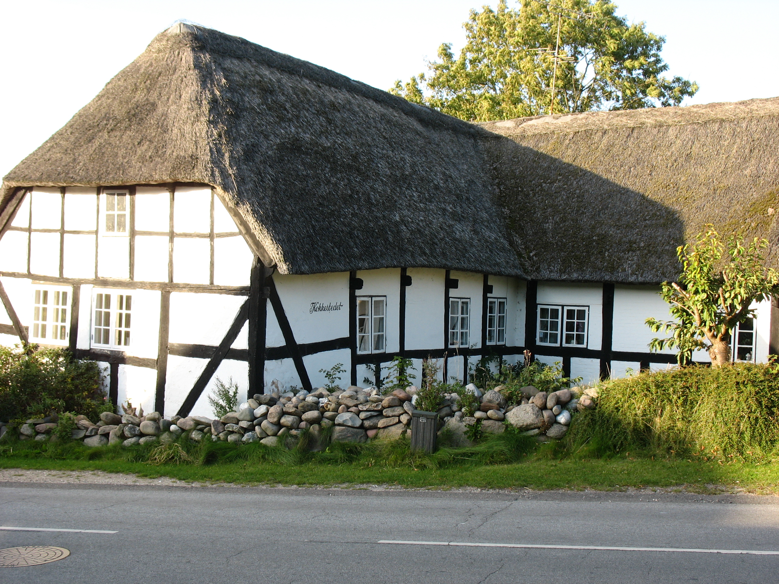 Gjerrild - bindingsværkshus ved kroen